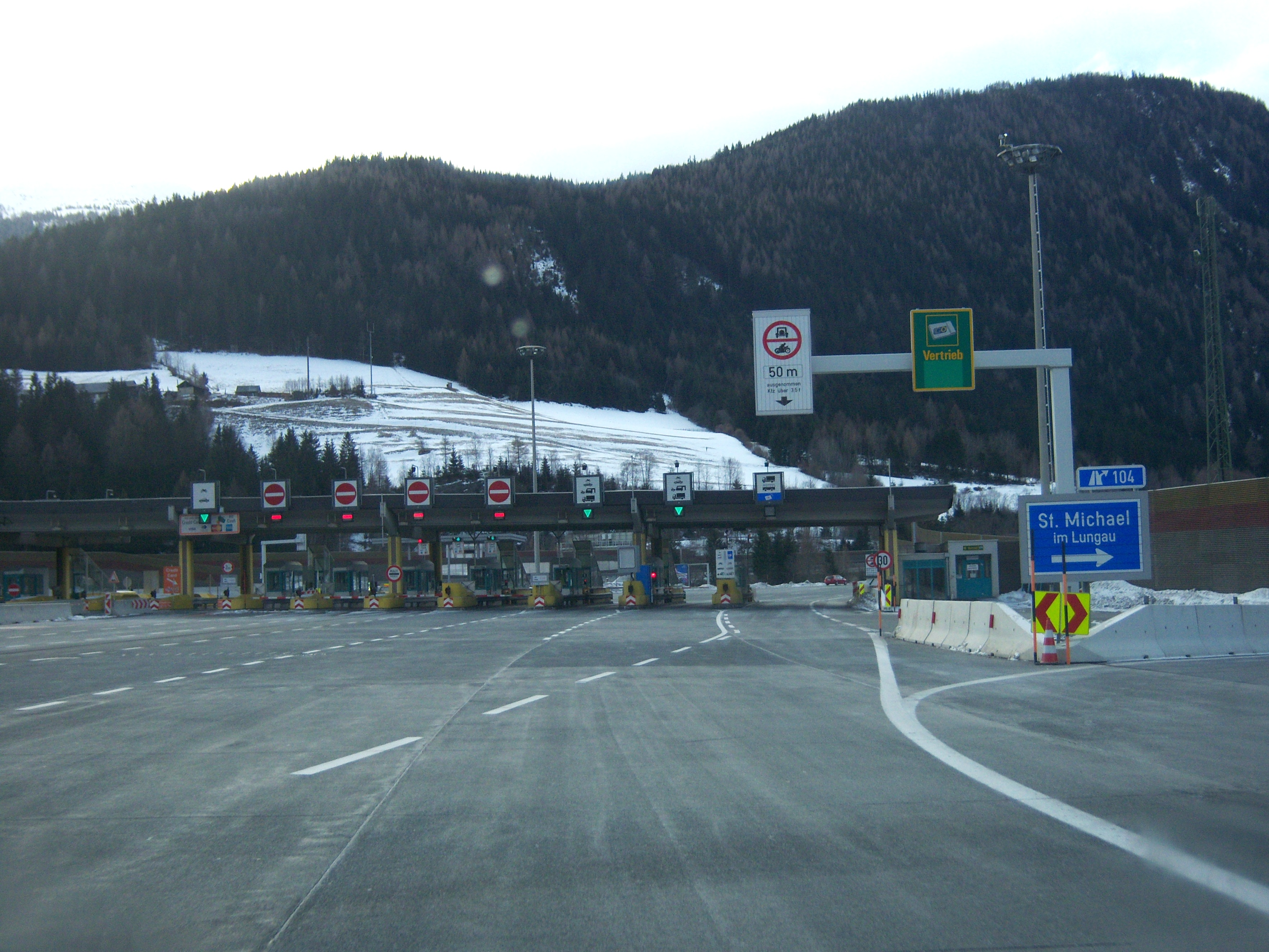 Tauern Autobahn A10 Richtung Villach im Bereich der Anschlussstelle und Mautstelle St. Michael